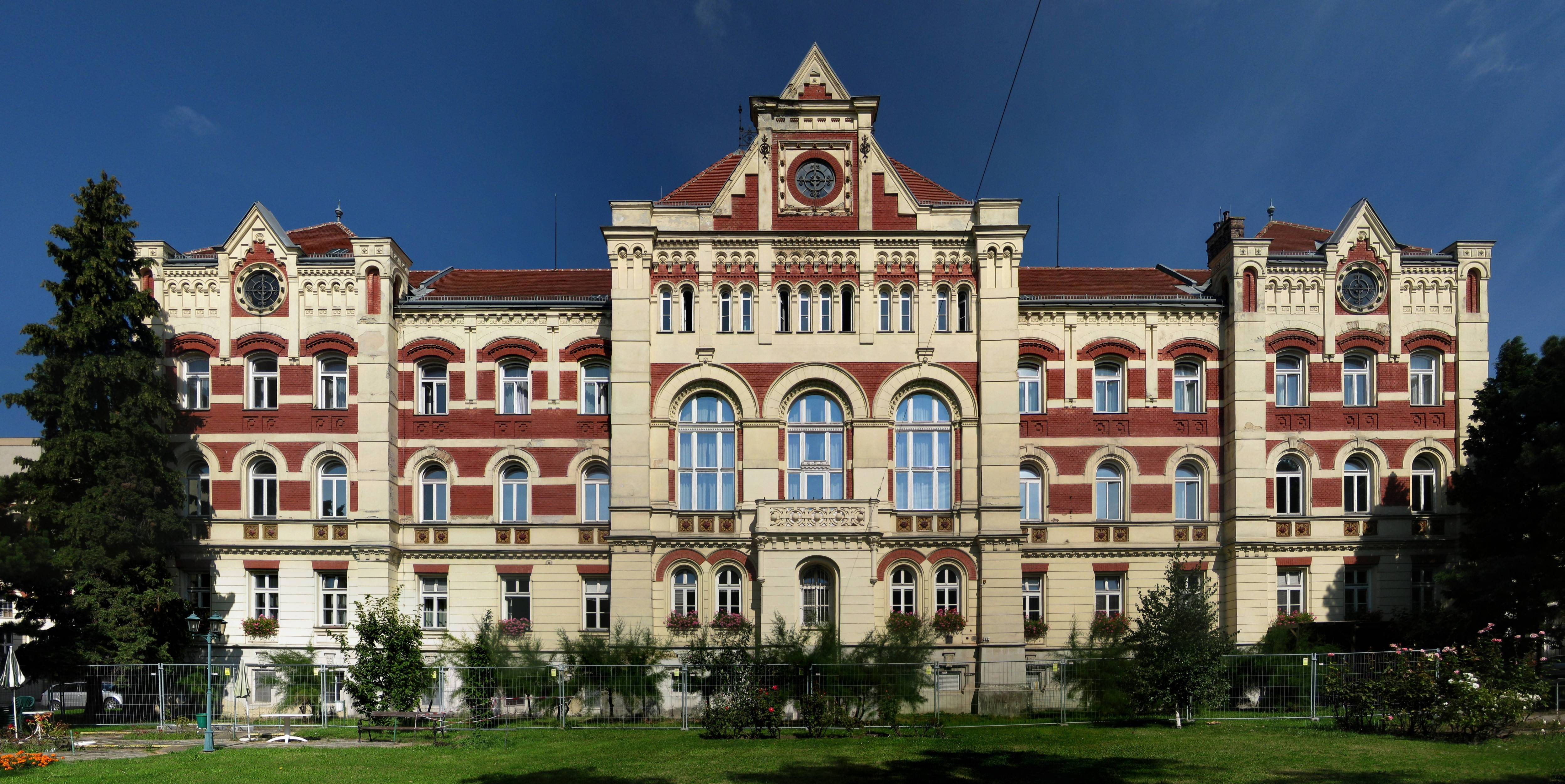 Pflegeheim Baumgarten, ehemalige Kaiser-Franz-Joseph-Landwehrkaserne